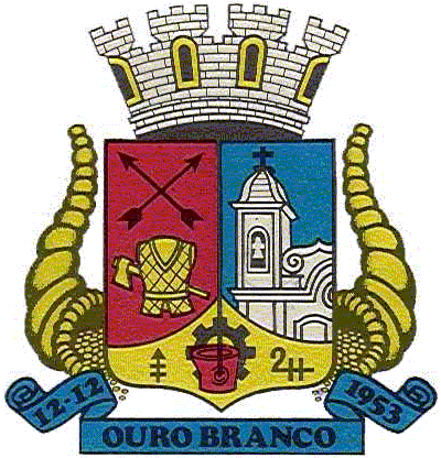 Brasão de ARmas do município de Ouro Branco, MG, Brasil.